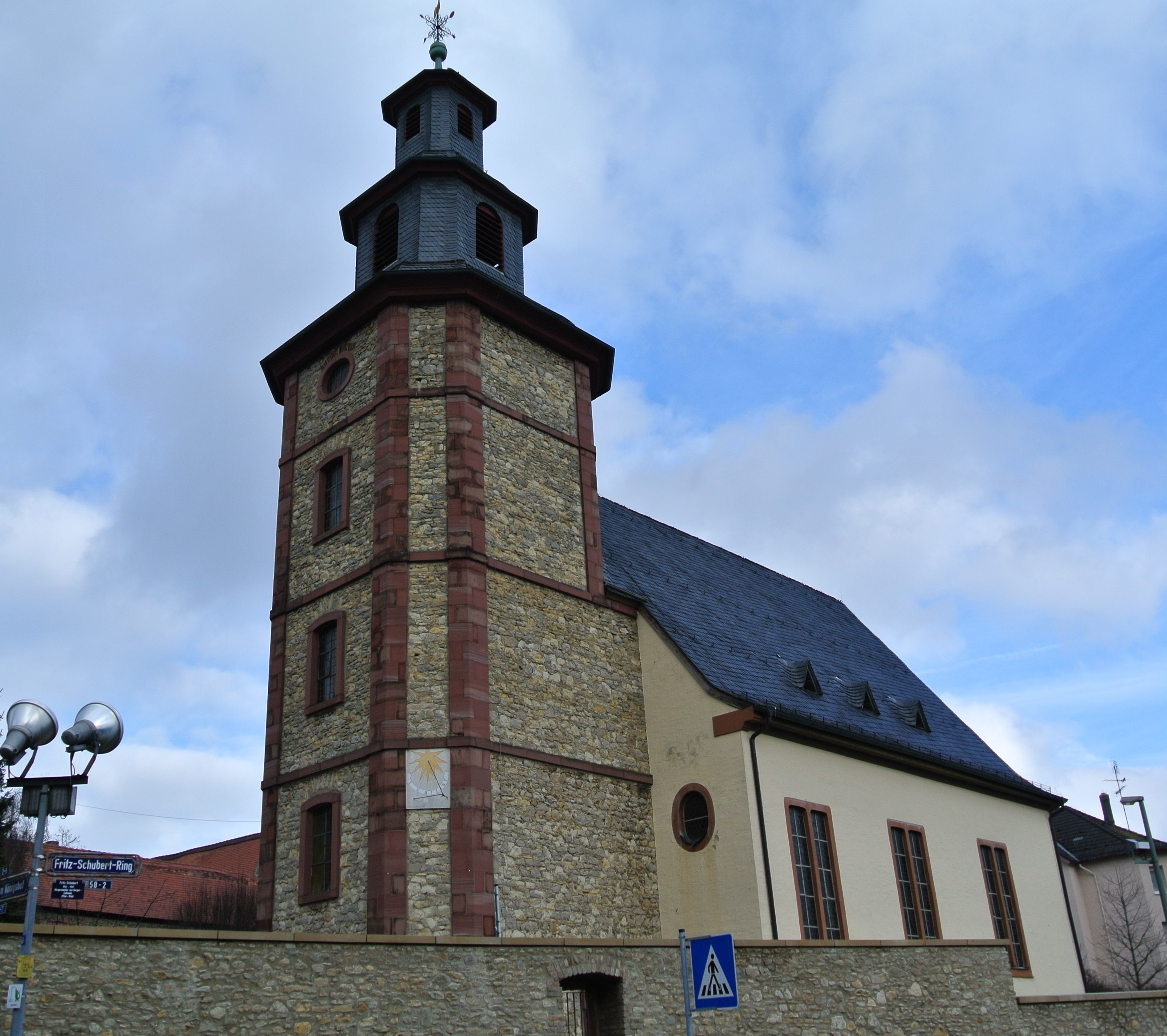 Evangelische Berger Kirche in Frankfurt-Bergen-Enkheim, Am Königshof; Bauzeiten 1684, 1741-1743; barocke Saalkirche; Baudenkmal